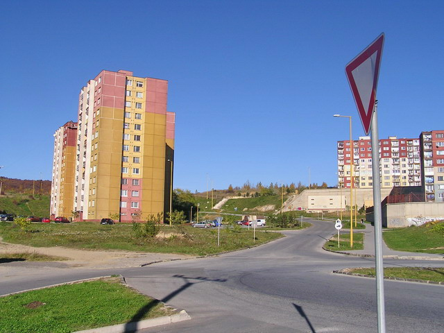 Madrid street